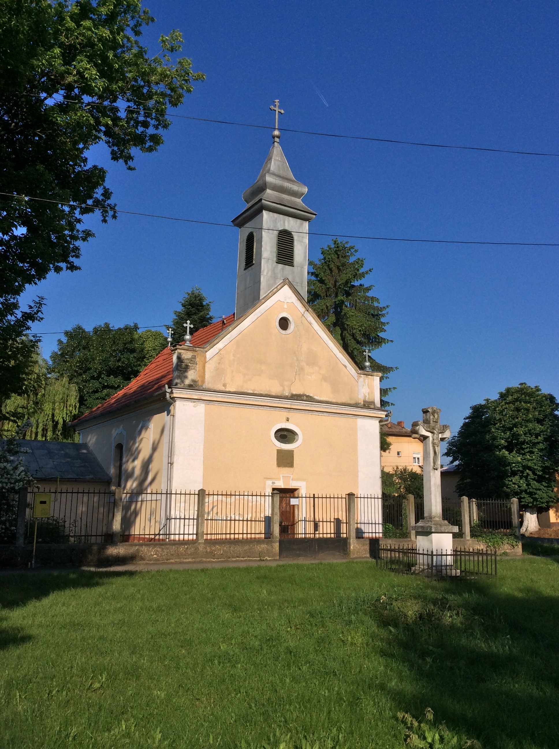 Hramul Bisericii - Sfânta Treime